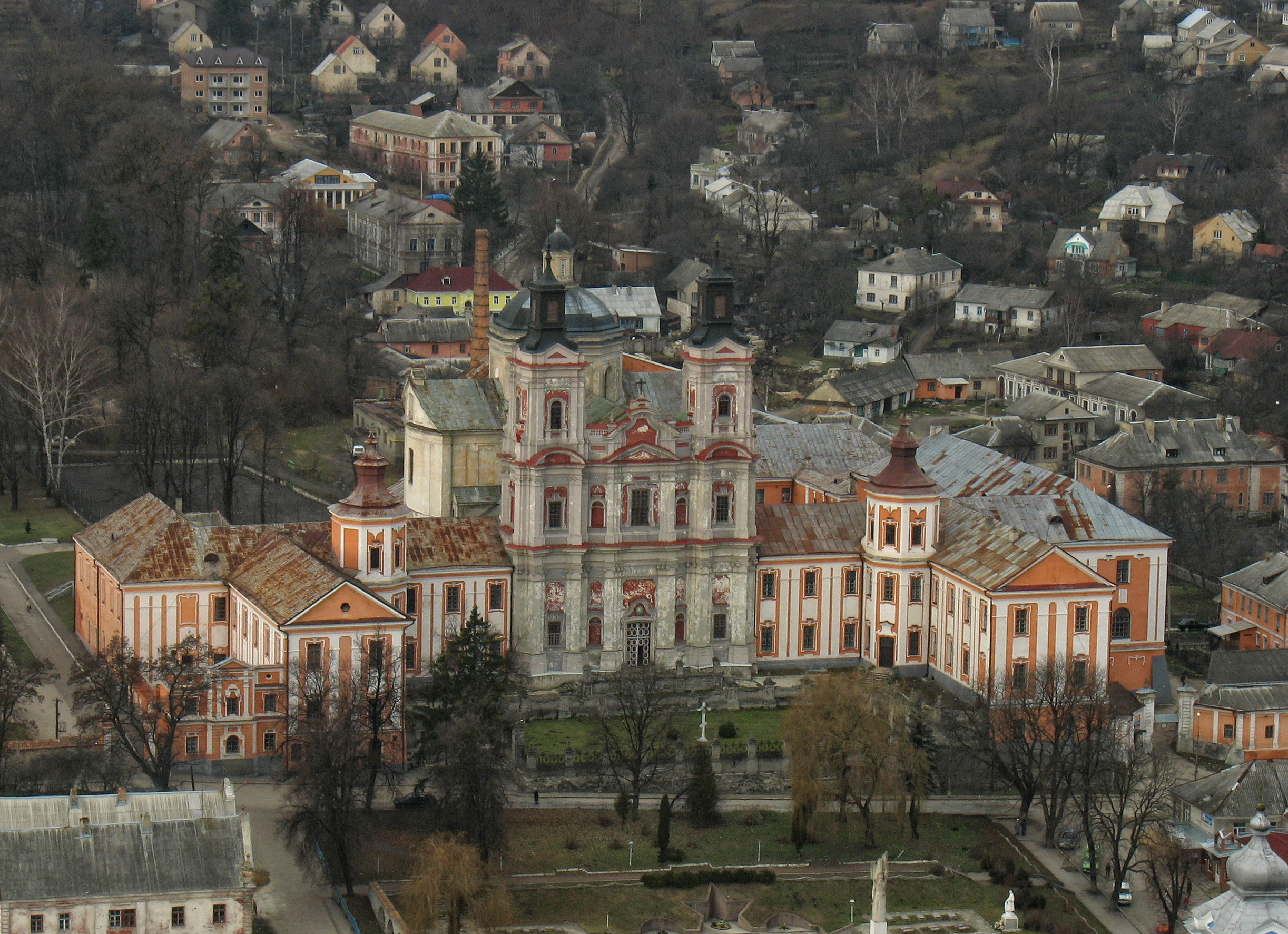 Кременець, Колегіум